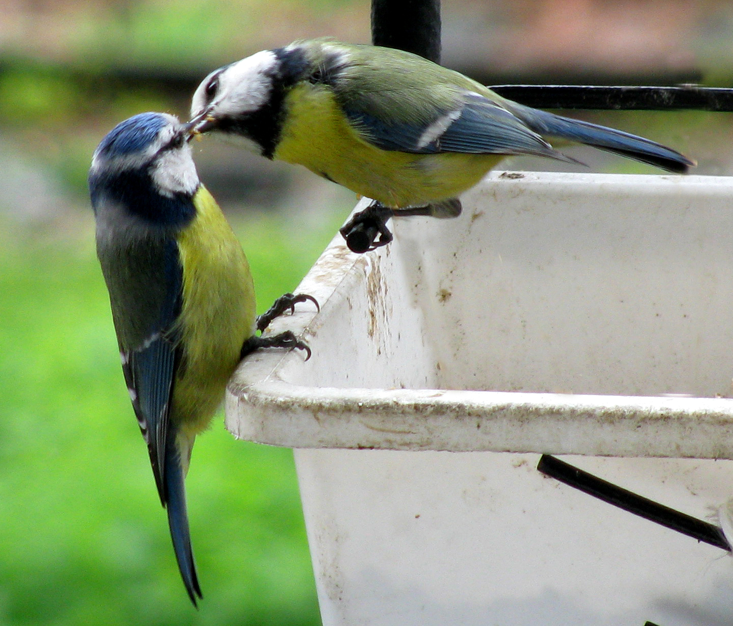 Mesanges bleues, Blue Tit, PARIS 2008